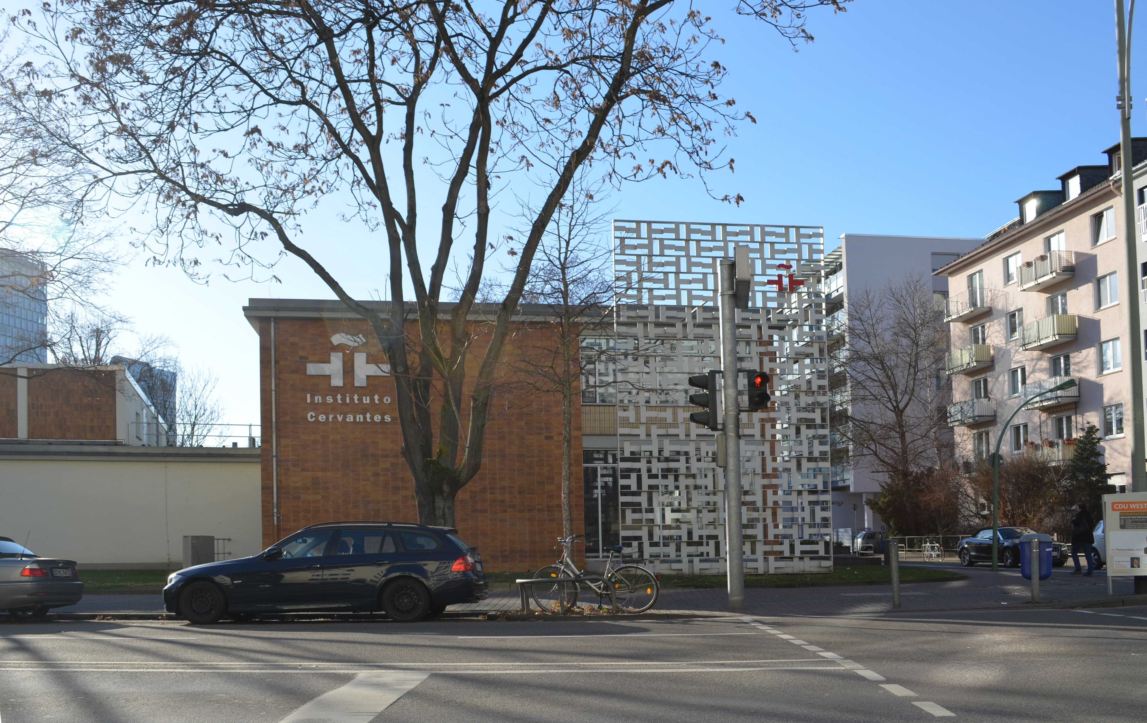 Frankfurt, Staufenstraße 1, Instituto Cervantes